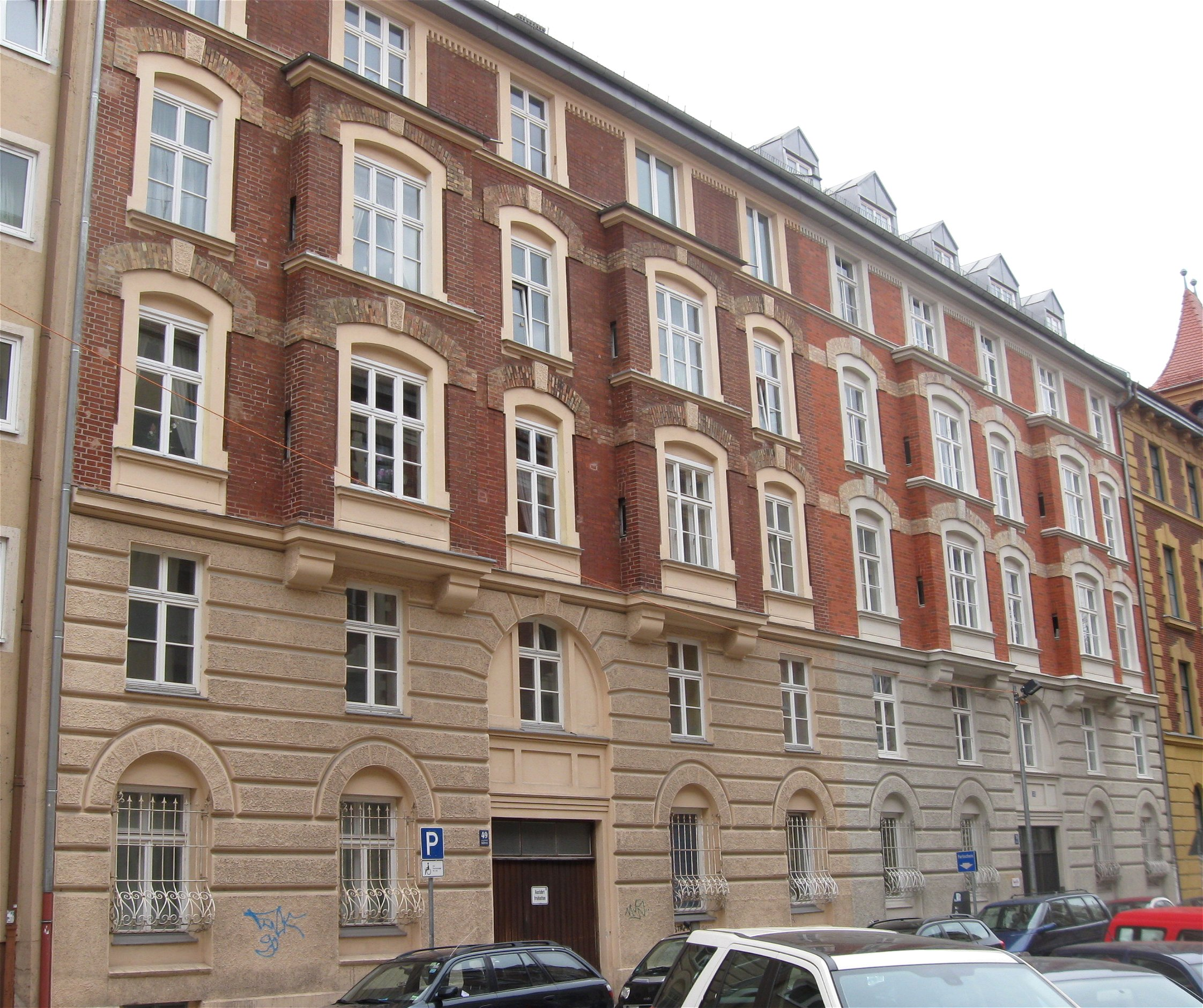 links: Adalbertstraße 49; Mietshaus mit Doppelerkerfassade, Neurenaissance, um 1899; vgl. Nr. 51 und 64. rechts: Adalbertstraße 51; Mietshaus mit Doppelerkerfassade, Neurenaissance, um 1899 von Johann Widmann; vgl. Nr. 49 und 64.